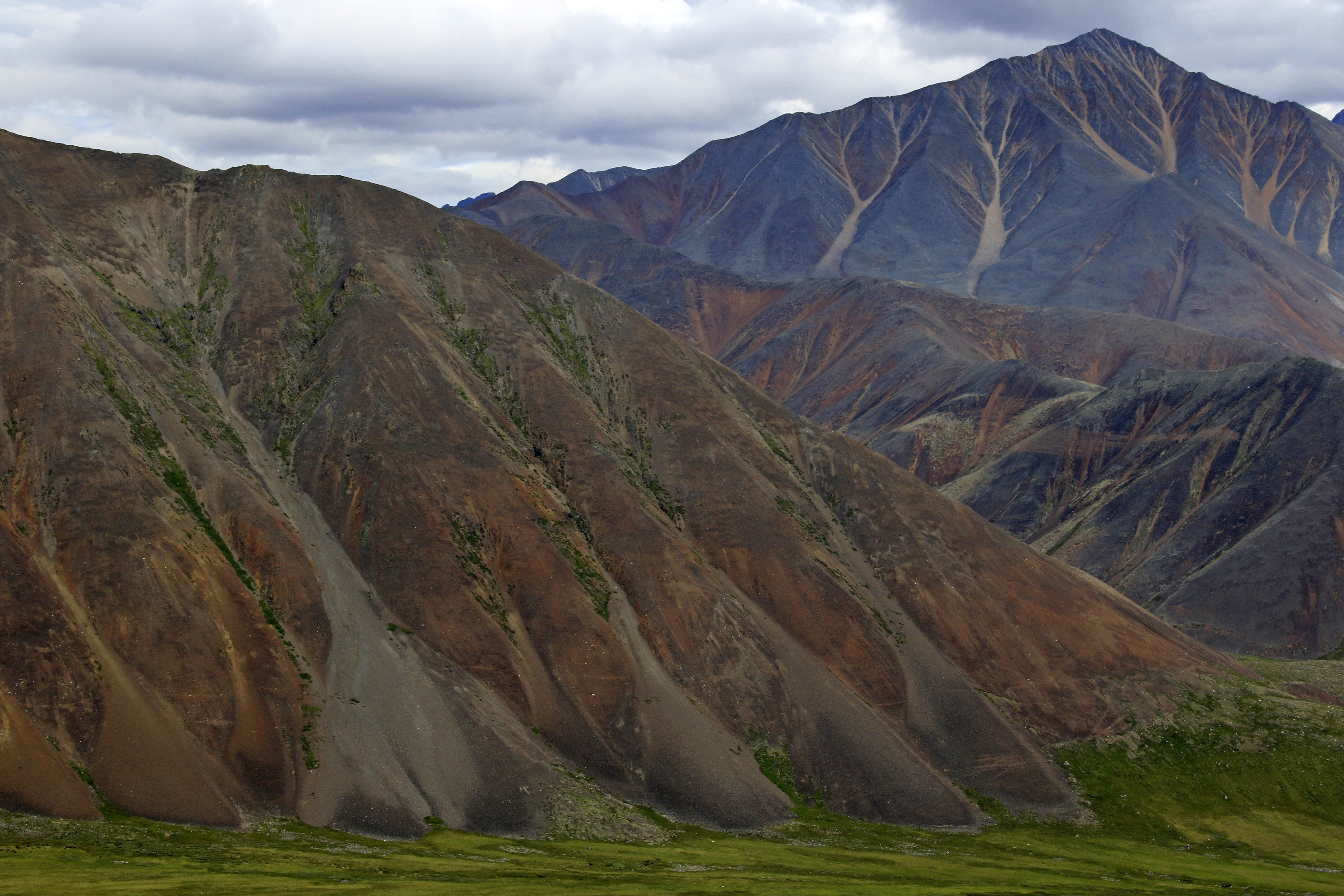 Момский: Расположен в восточной части Момо-Селенняхской впадины и охватывает собой территорию верхней части бассейна реки Момы, включая Буордахский горный массив с пиком г. Победа (3 003 м), Момский район, Якутия (Саха) This image is related to the protected area of Russia number 1410127